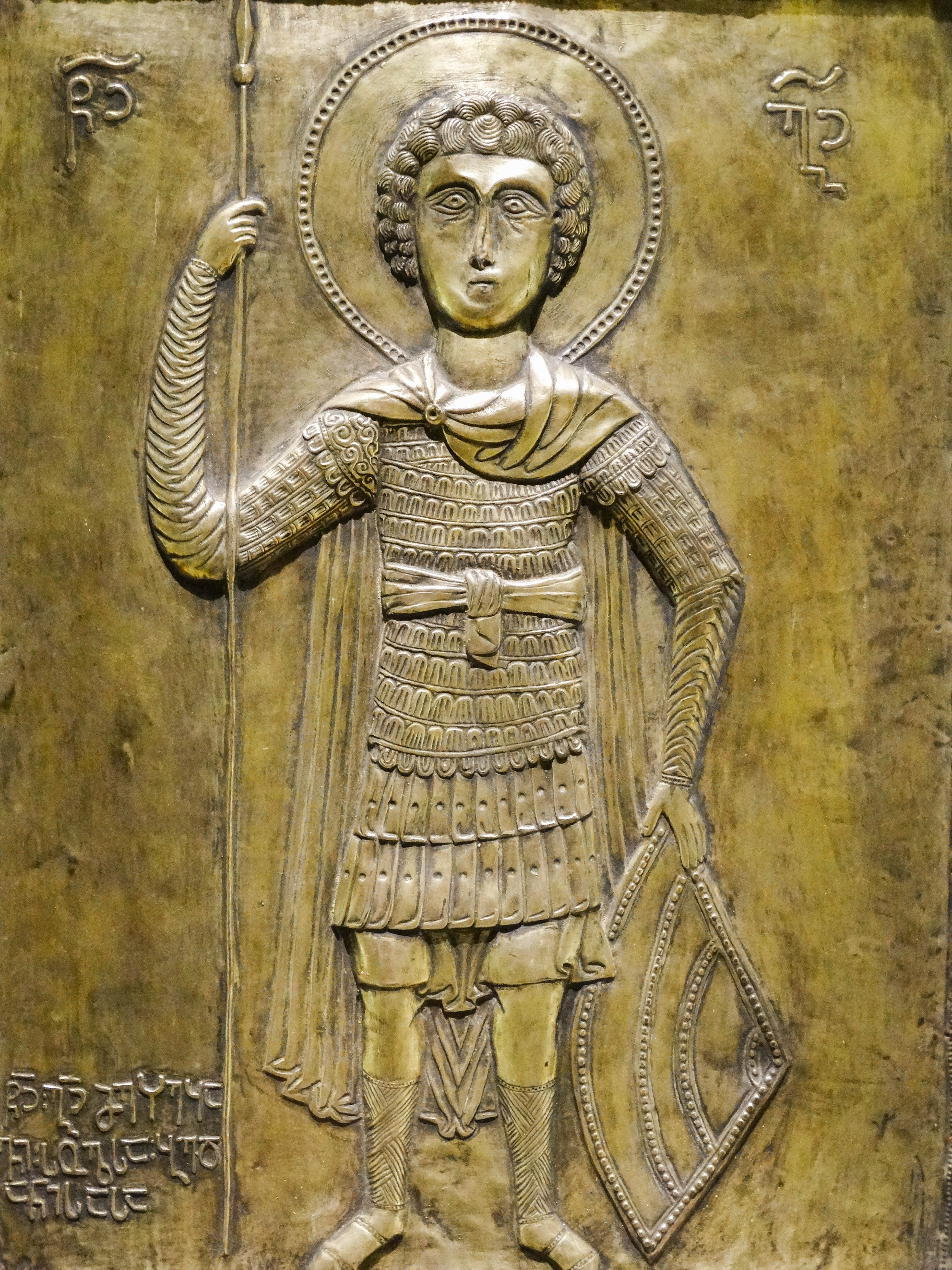 DSC01414-2